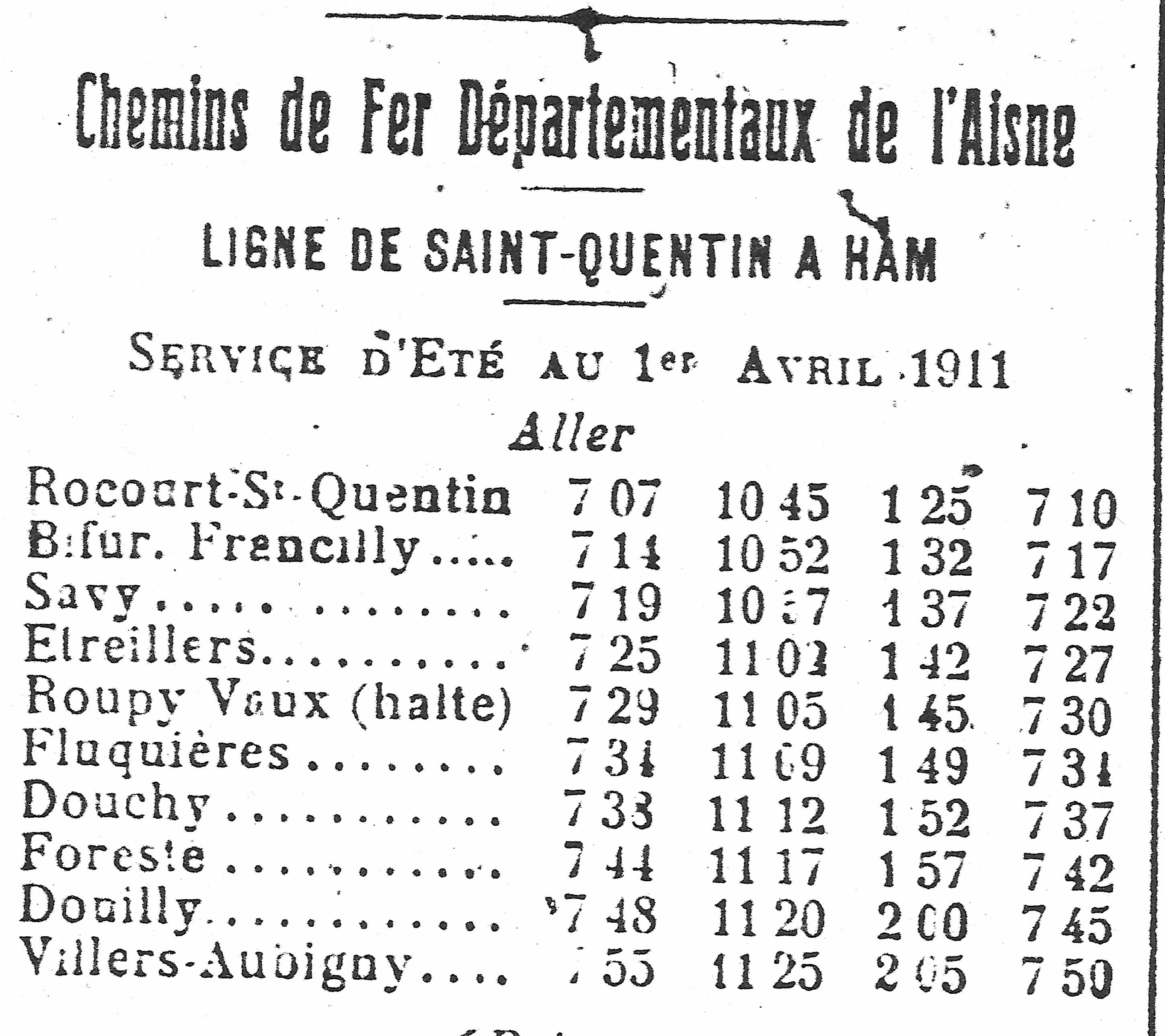 Horaire du Vélu 1911